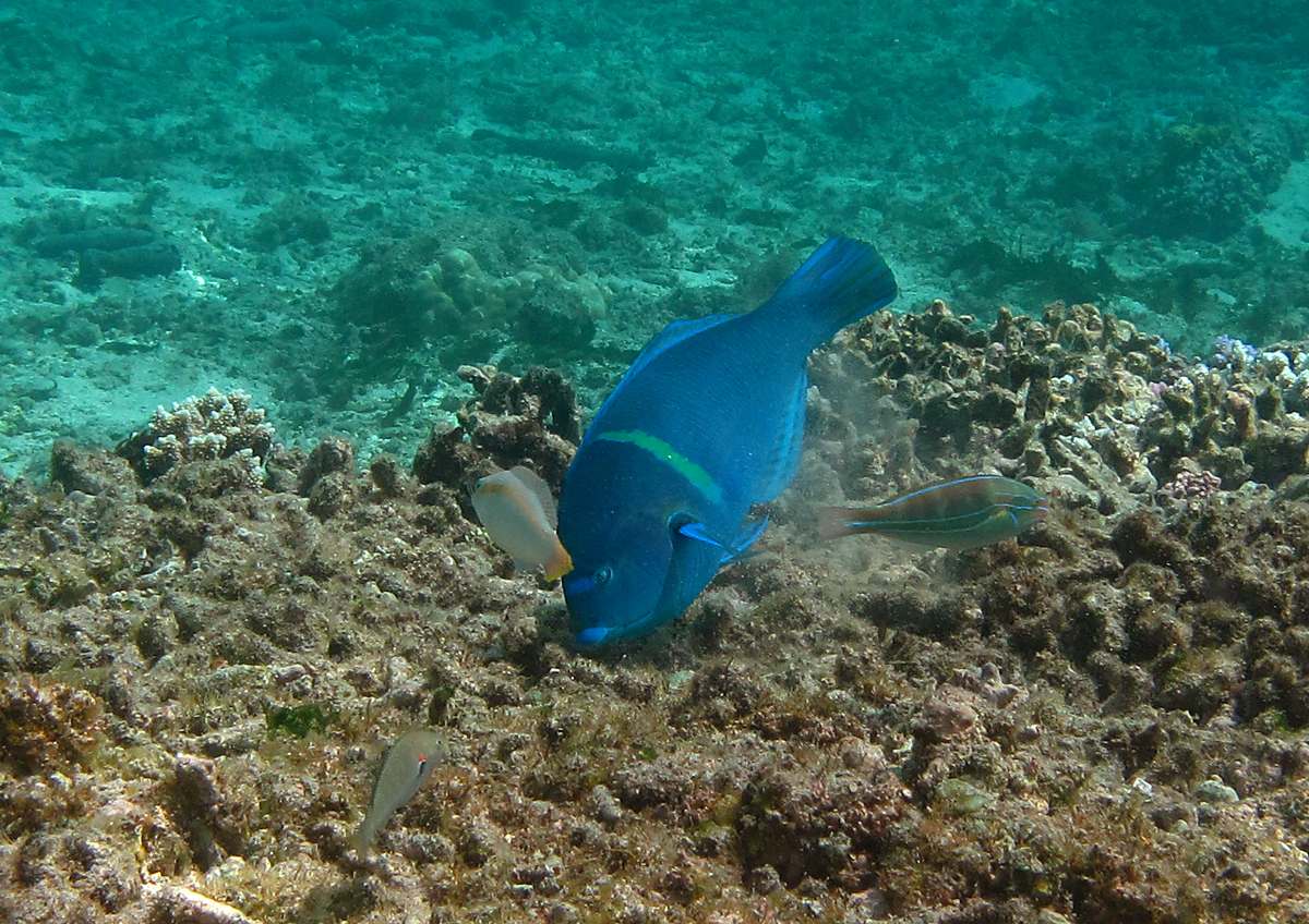 Un labre constellé (Anampses caeruleopunctatus) en phase finale (mâle) à la Réunion.